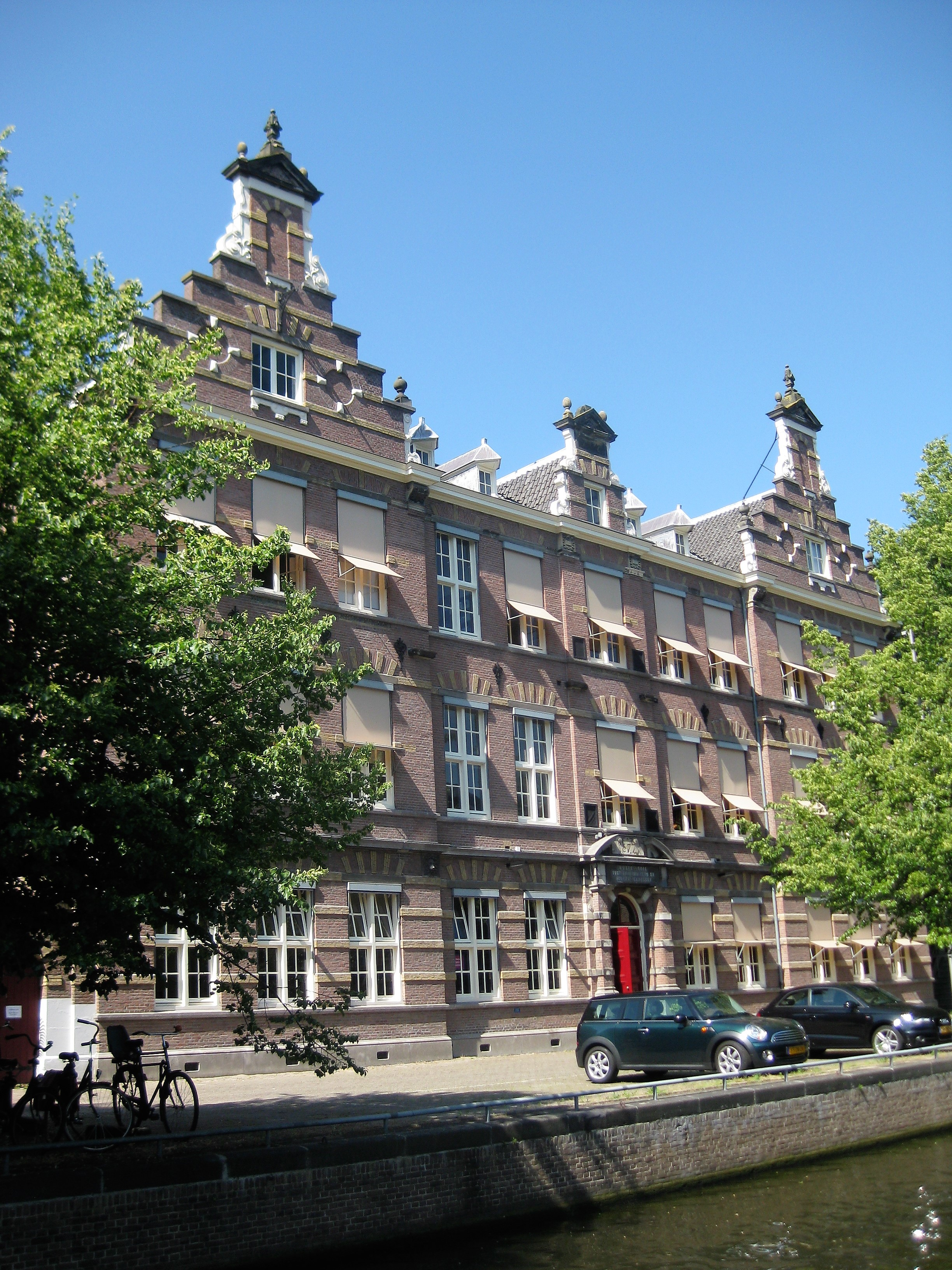 Nieuwe Prinsengracht 89, Amsterdam Kweekschool voor onderwijzers en onderwijzeressen